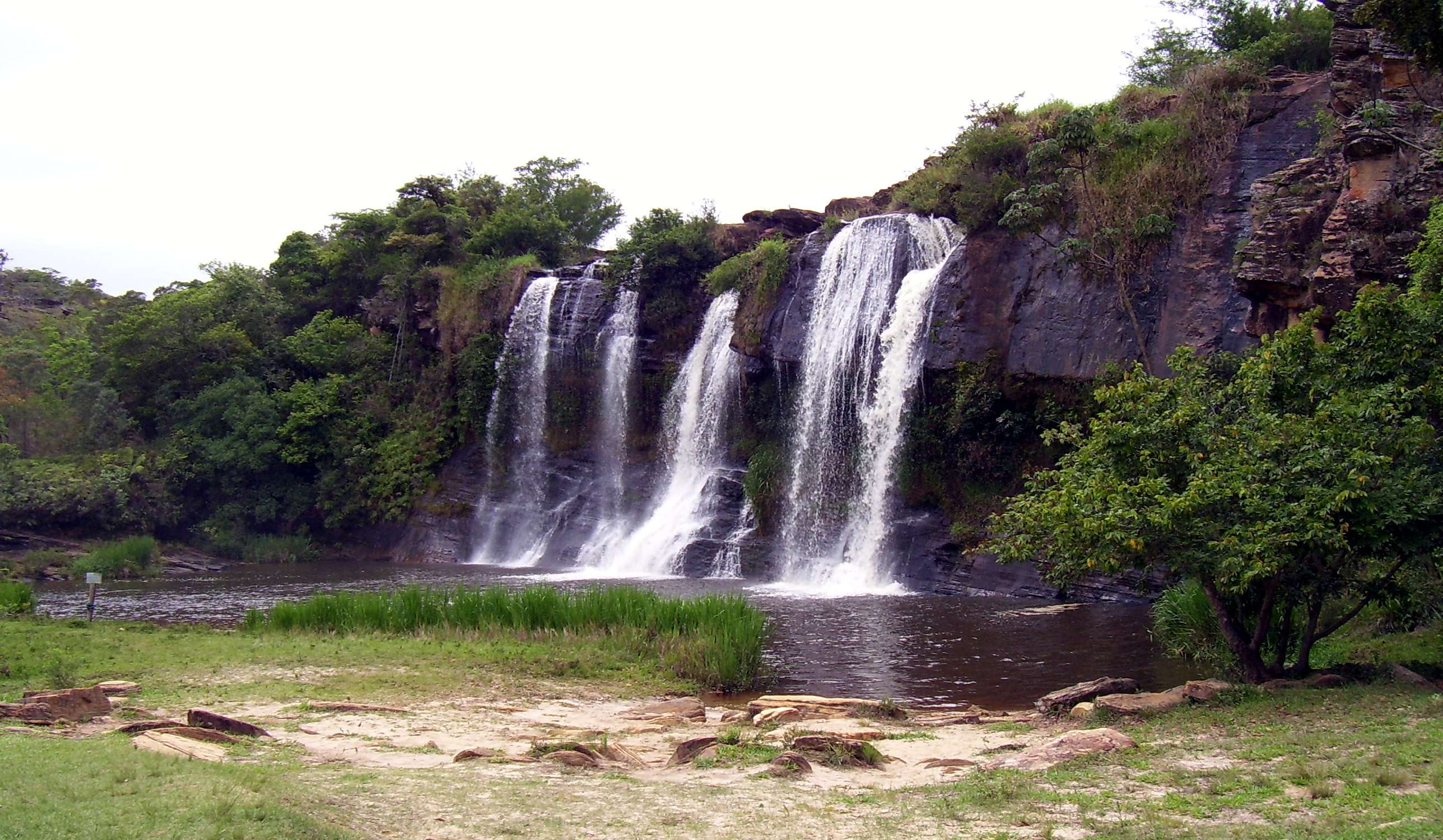 Cachoeira da Fumaça, localizada no município de Carrancas, MG, Brasil.